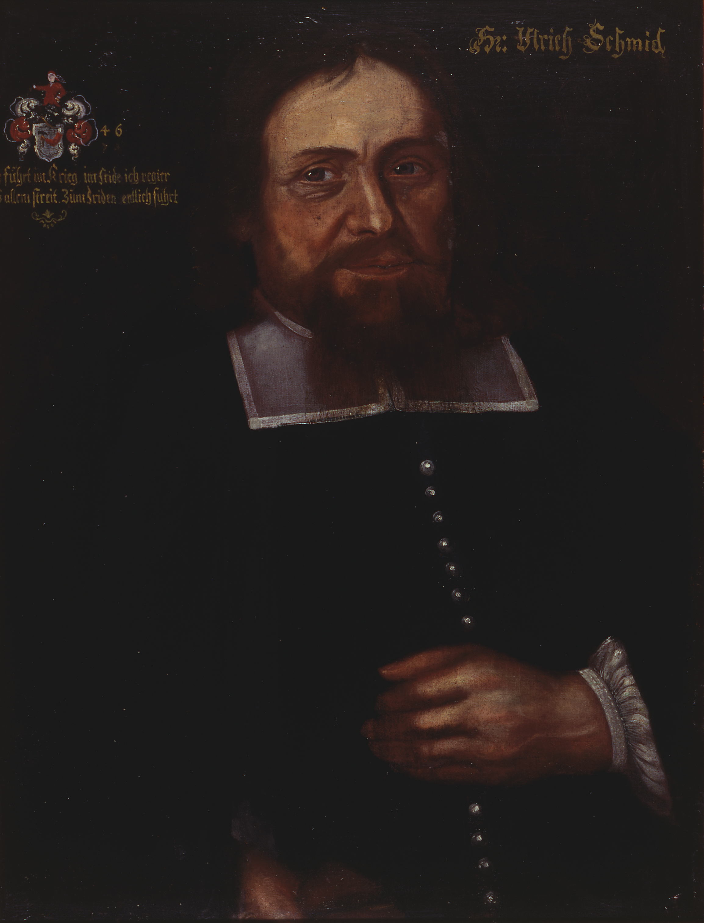 11. Landammann von Appenzell Ausserrhoden, Brustbildnis